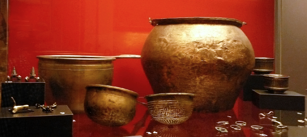 Grabinventar des Fürstengrabs von Marwedel